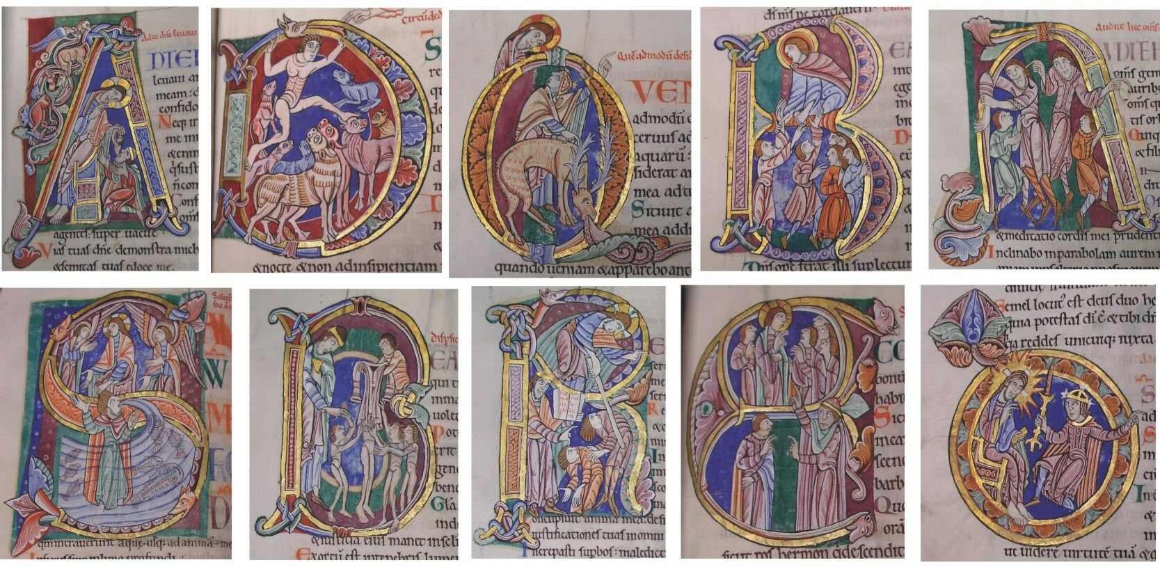 Albani-Psalter, Initialen